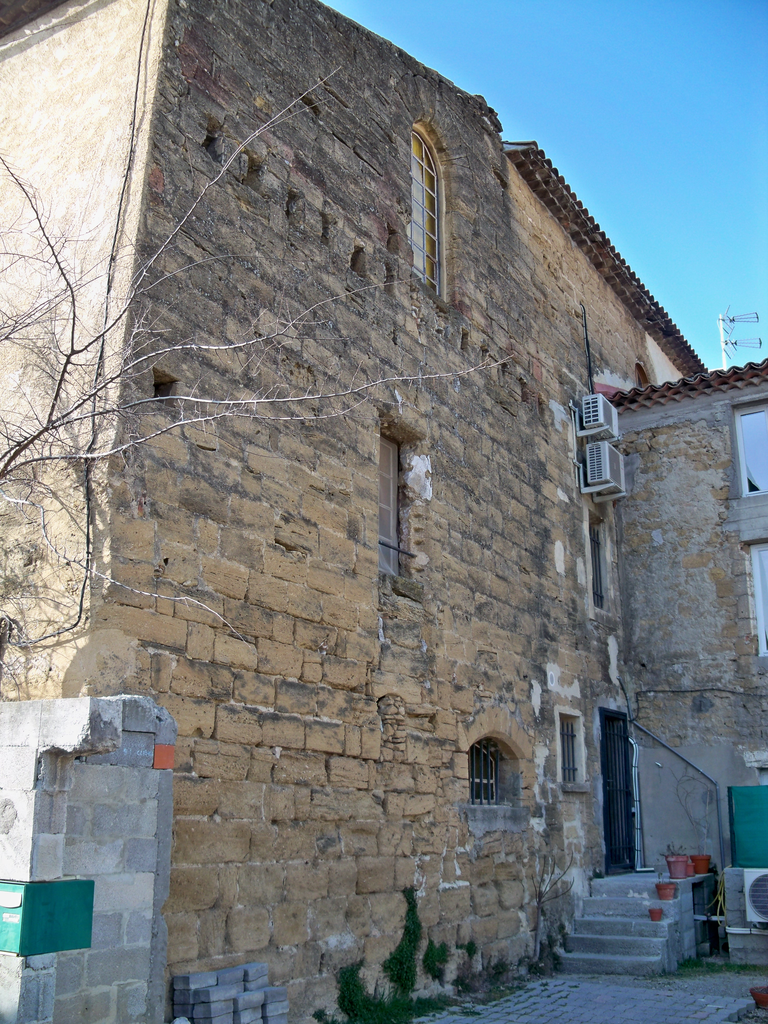 Palais des Papes de Sorgues - arrière du batiement